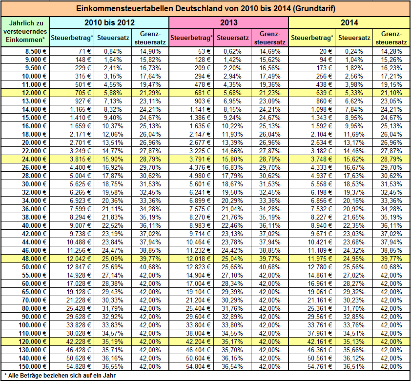 Einkommensteuertabellen (Grundtarif in Deutschland) für die Jahre 2010 bis 2014